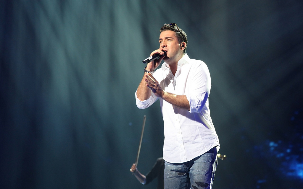 Zeljko Joksimovic